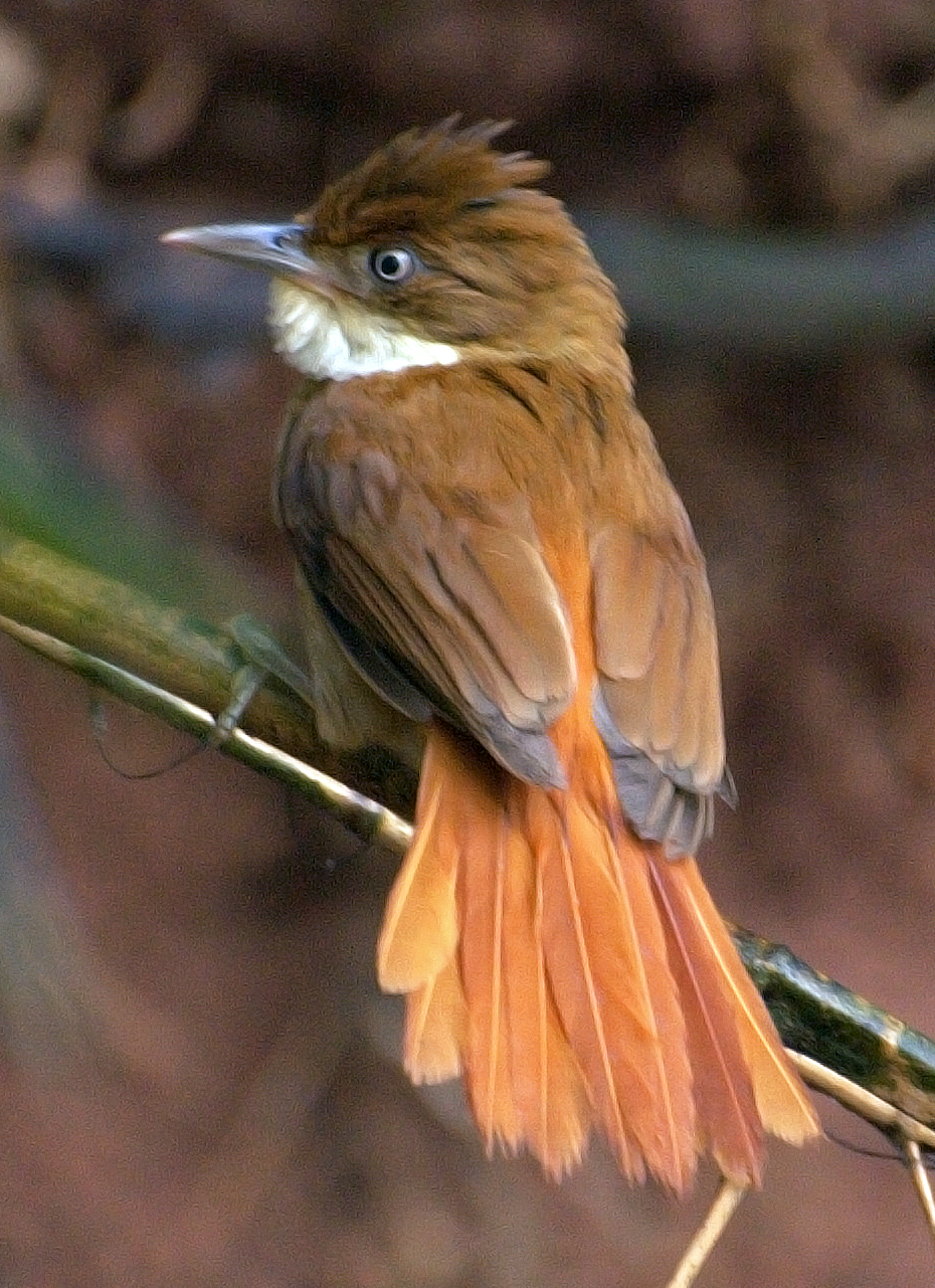 Piraju-SP - Brasil